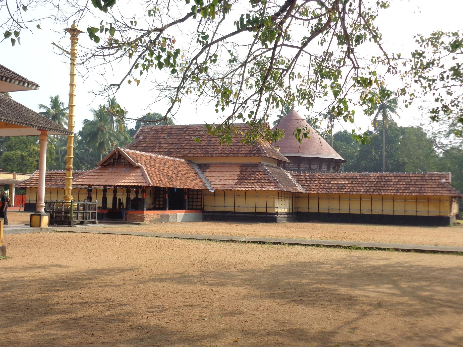 തിരുവൻ വണ്ടൂർ ക്ഷേത്രം ഒരു ദൃശ്യം